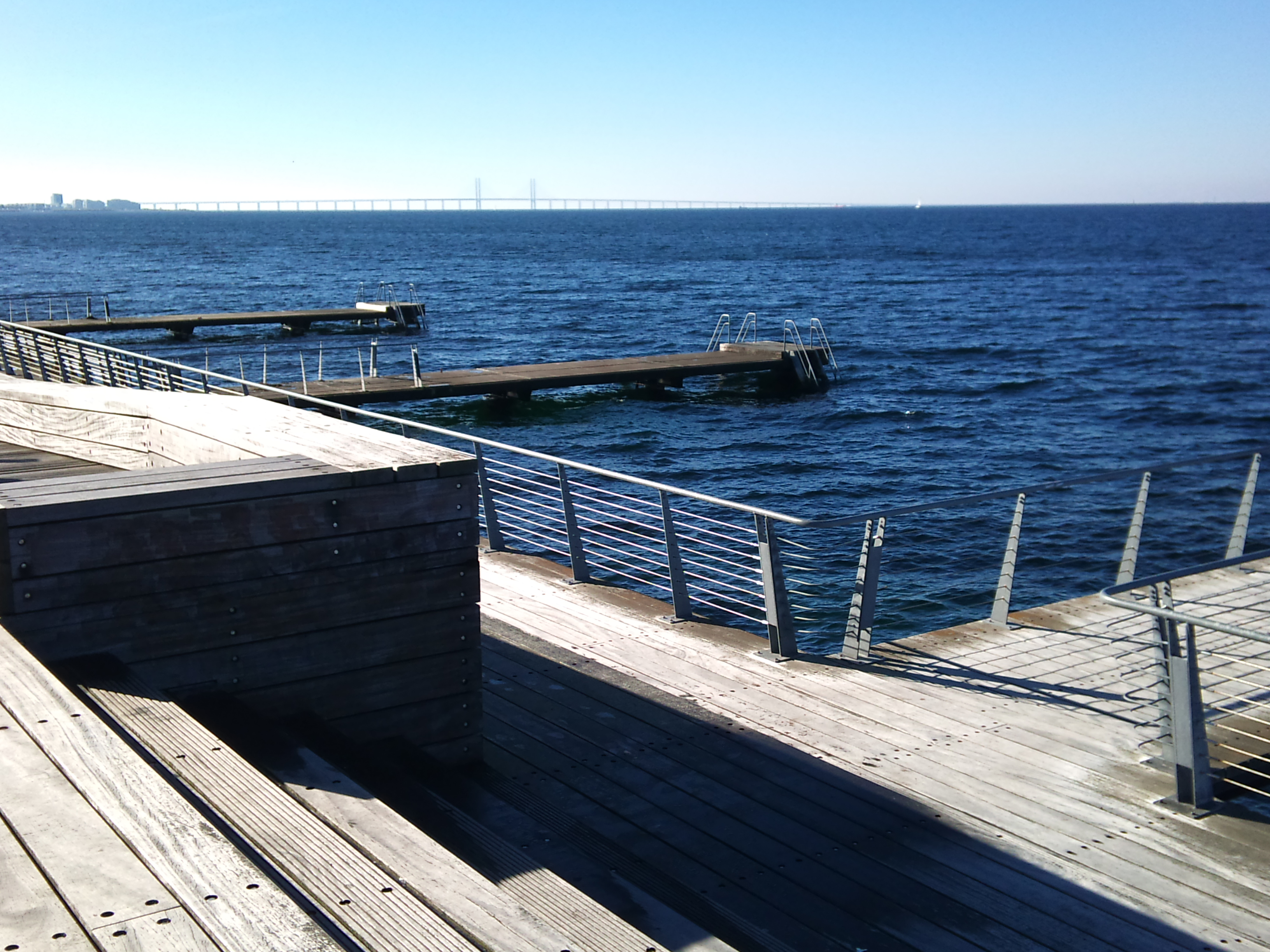 Vy över Scaniabadet i Västra hamnen, Malmö.